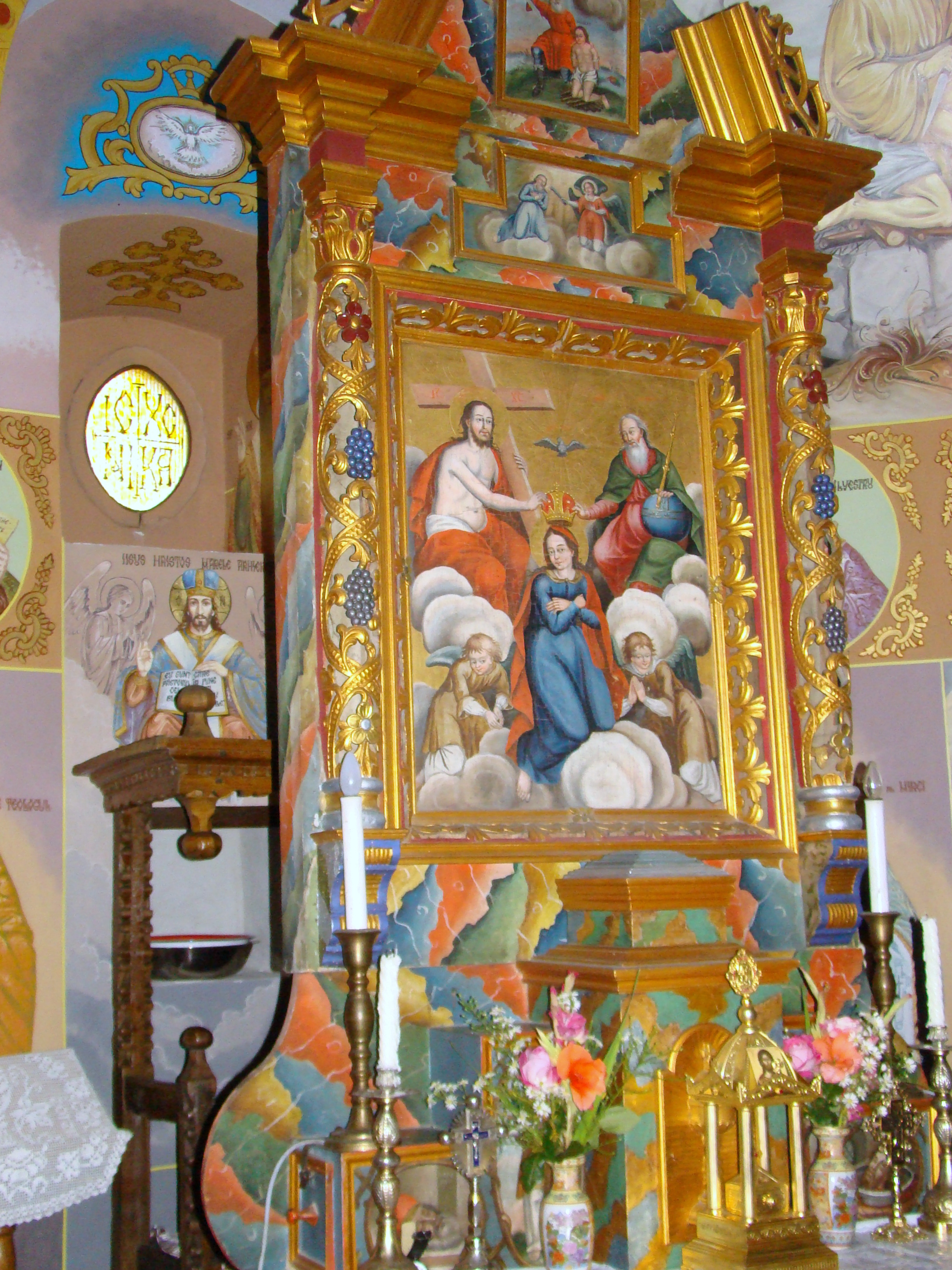 Biserica "Cuvioasa Paraschiva", sat Cetățele; comuna Șișești 01